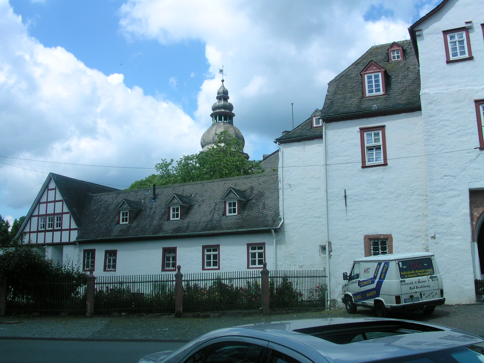 Bad Berleburg, Schloß